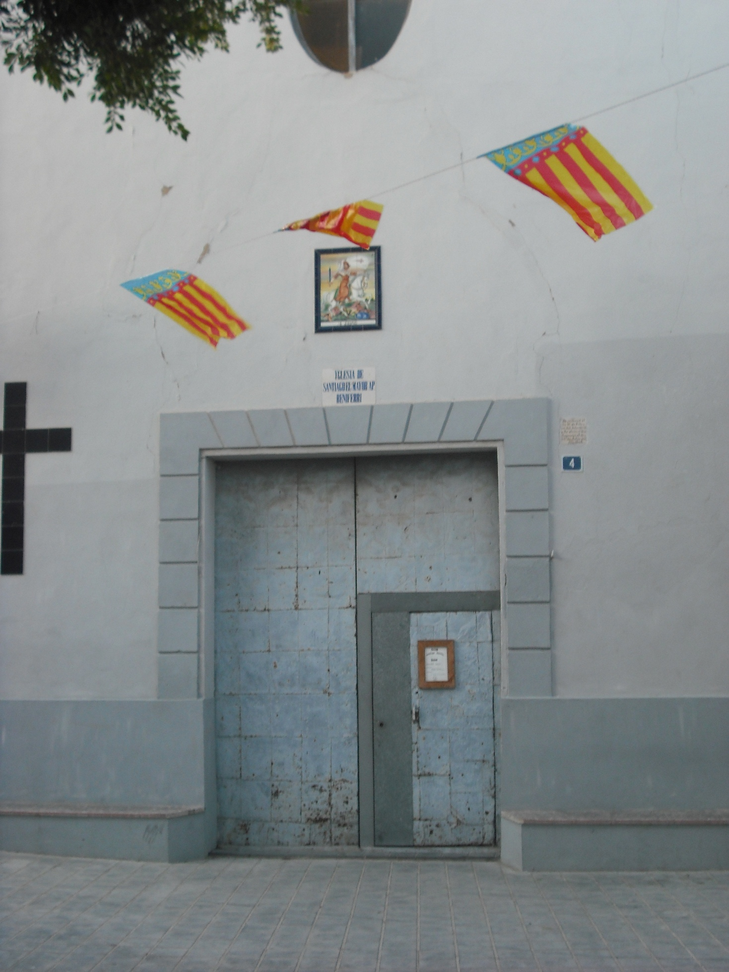 Portada de l'església de Sant Jaume de Beniferri.